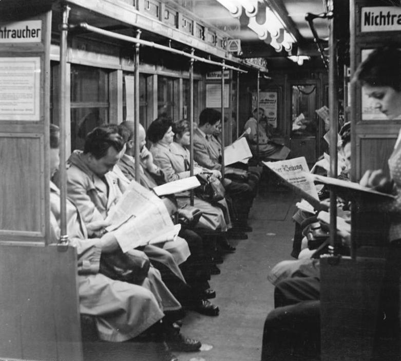 Zentralbild Hesse Froe-He 29.5.58 Neues Gesetz mit Interesse aufgenommen. In den Morgenstunden des 29.5.1958 auf der U-Bahnlinie E zwischen Friedrichsfelde und Alexanderplatz: wie überall, so interessierten sich auch hier die werktätigen Berliner in der Zeitung für die am 28.5.58 beschlossenen Gesetze und Maßnahmen über den Wegfall der Rationierung.